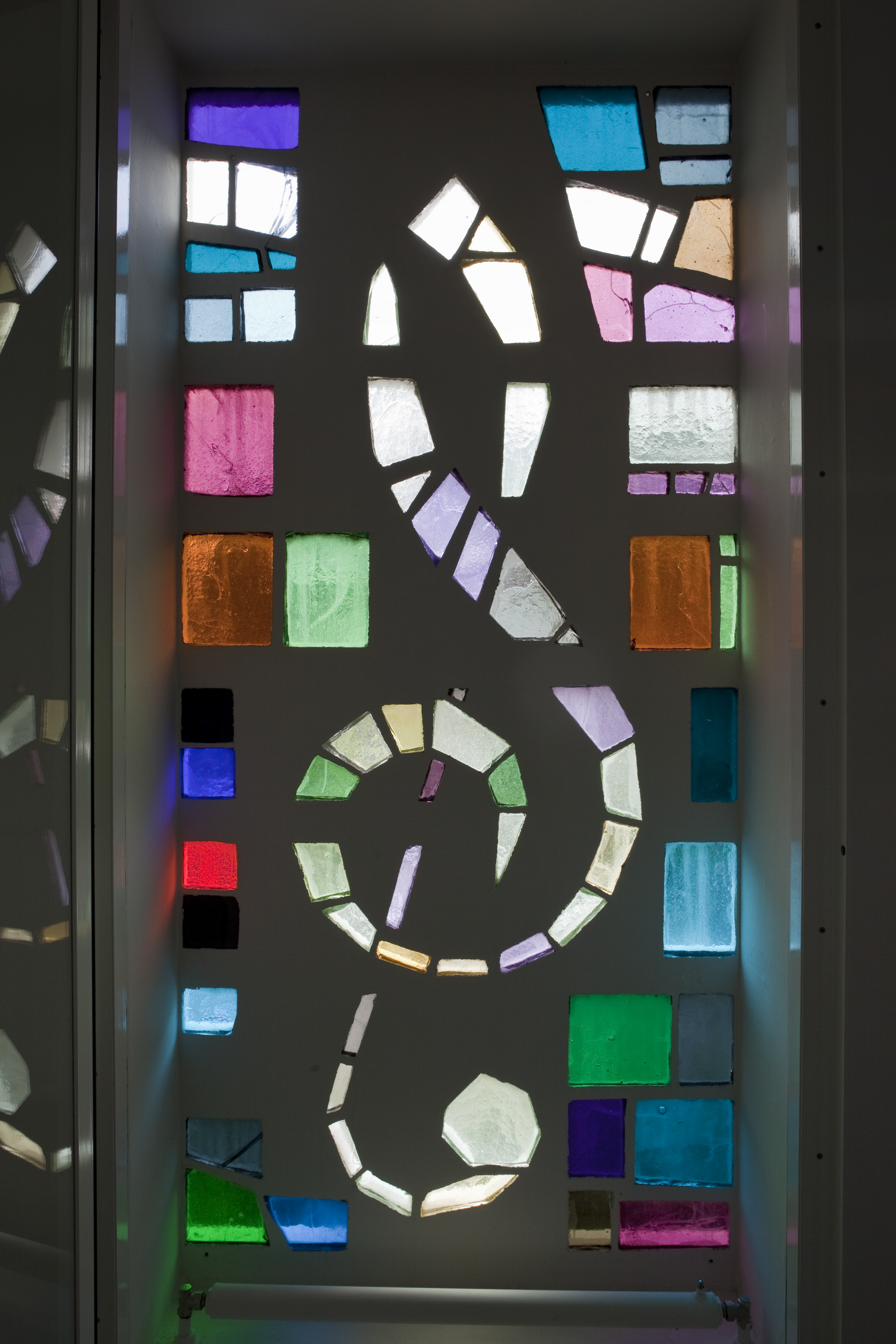 Voormalig kantoor Bovema Platenmaatschappij: Interieur, detail, glas in betongevel in de vorm van de G-sleutel